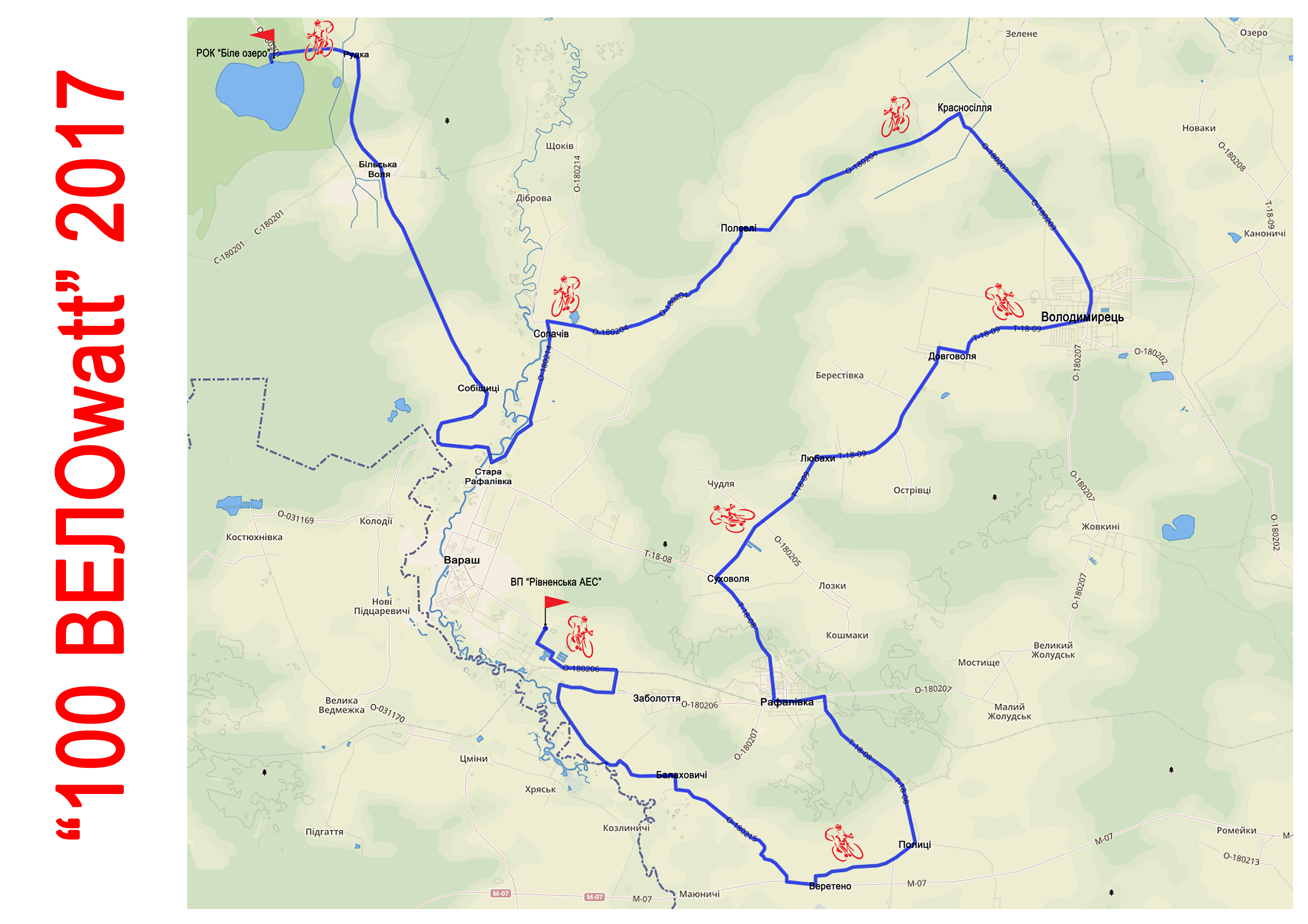 Маршрут веломарафону "100 ВЕЛОwatt" проліг другорядними дорогами Володимирецького району від Рівненської АЕС до Білого озера